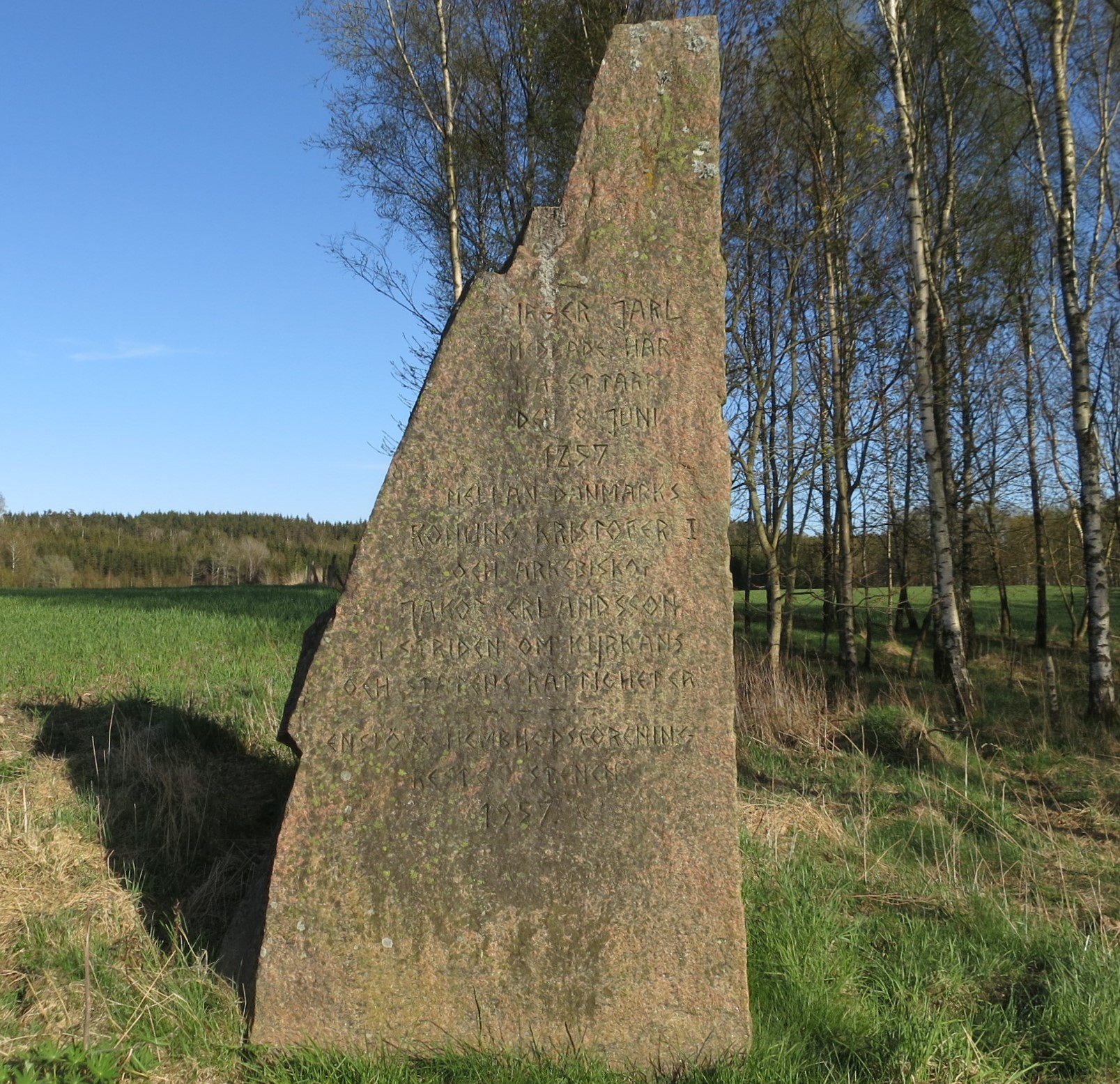 Stenen restes till minne av Ettarpsmötet 1257.